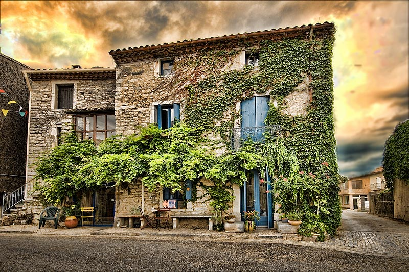 A fabulous roadside cottage, Les Cevennes hills.